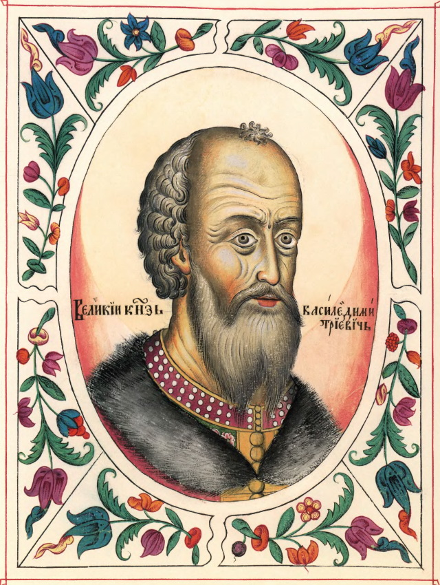 Василий I Дмитриевич. С Царского Титулярника